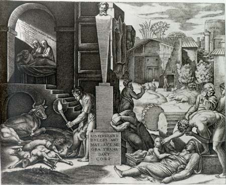 Il Morbetto